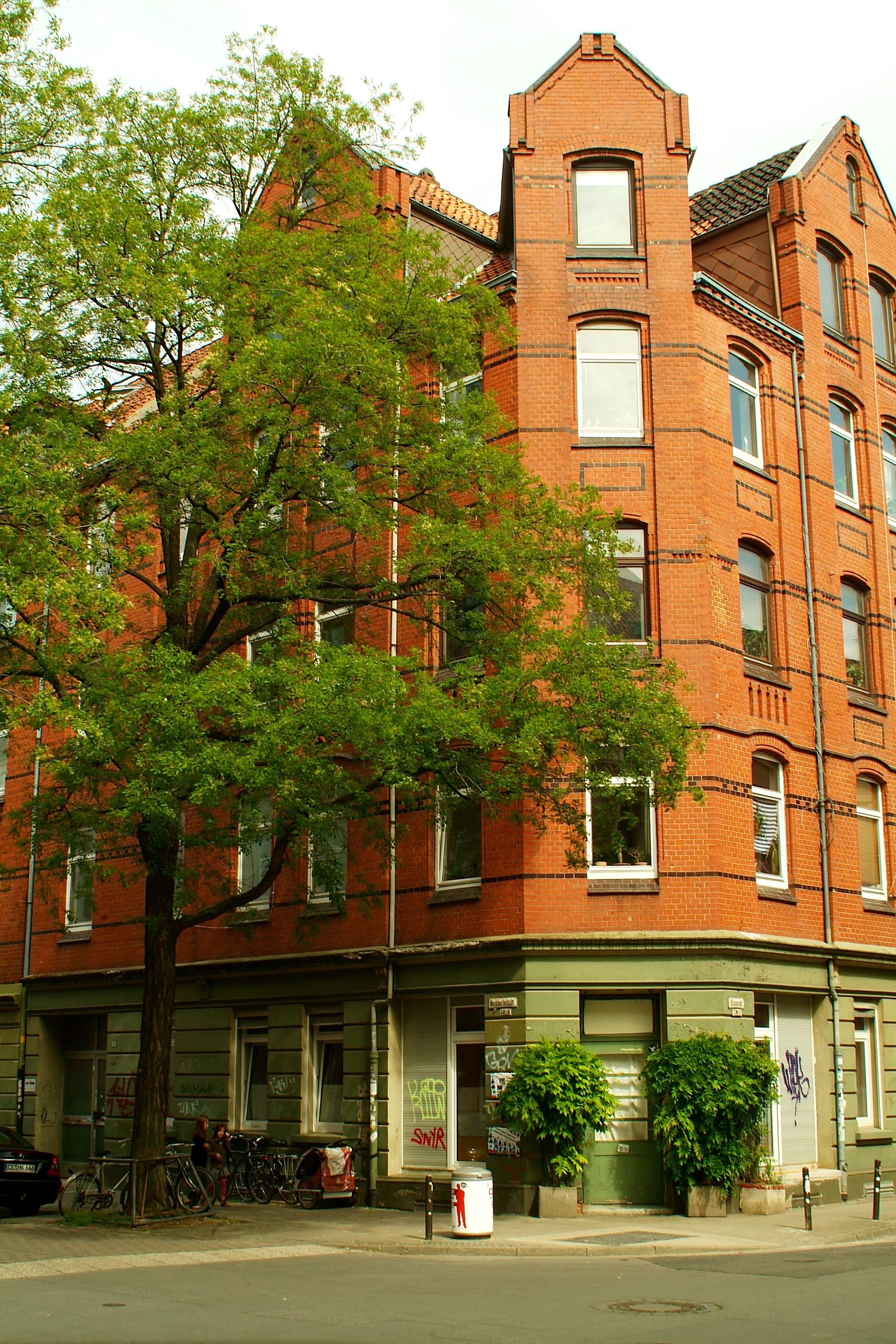 Im Haus Nedderfeldstraße 8/Ecke Elisenstraße wohnte Wilhelm Bluhm in der zweiten Etage rechts. Ein Stolperstein vor dem Gebäude erinnert an den 1942 im KZ Sachsenhausen Ermordeten.